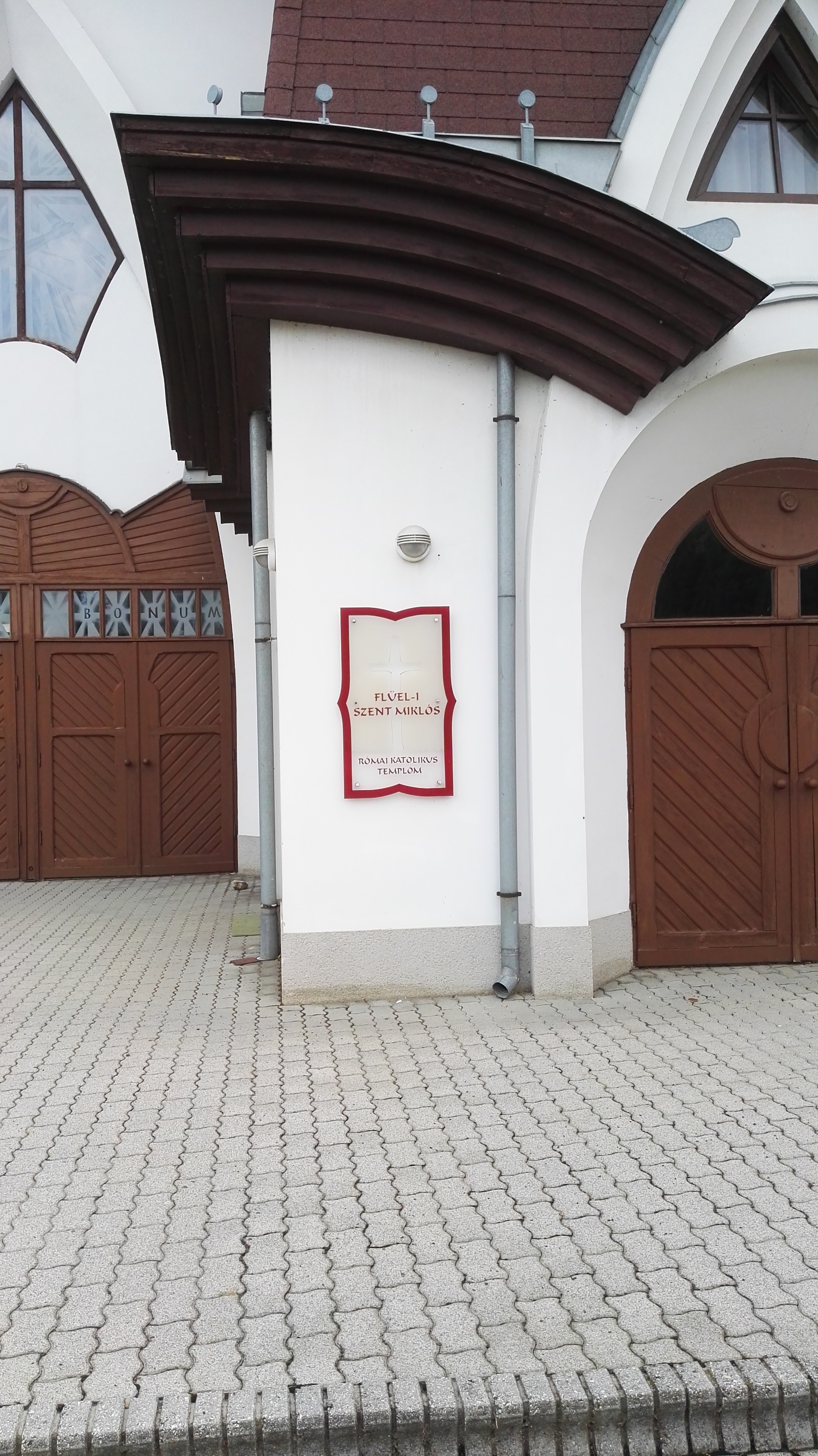 Flüel-i Szent Miklós templom táblája. Sajnos rossz az elnevezés, ugyanis Flüei Szent Miklós a szent helyes neve.